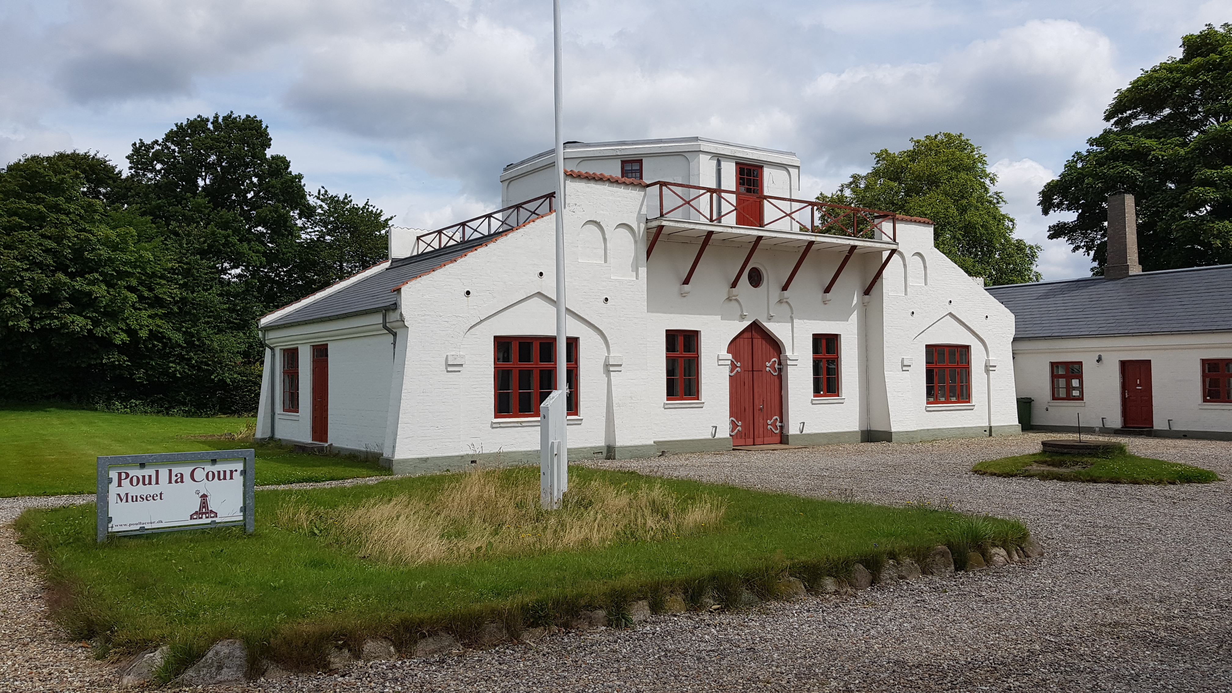 Poul la Cour Museet